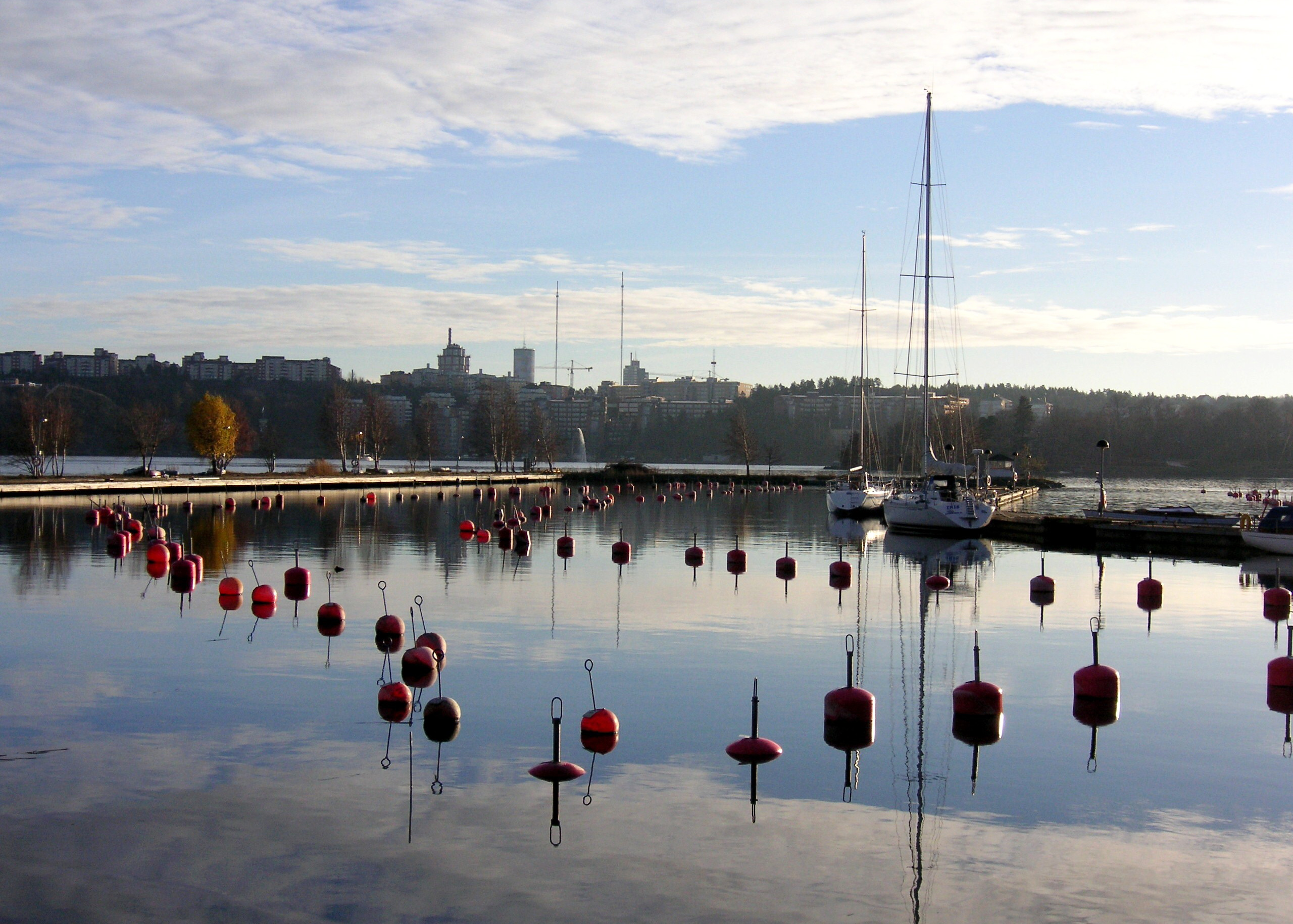 Hundudden på Gärdet i Stockholm